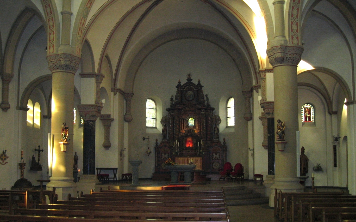 Description: Altar der Pfarrkirche St. Blasius (romanische Hallenkirche, 12./13. Jahrhundert) in Balve Source: selbst fotografiert Date: 9. Okt. 2005 Author: Bubo